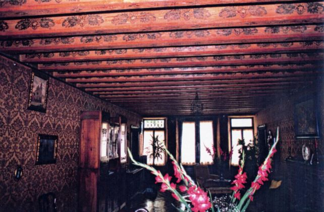 Interni di Villa Dora